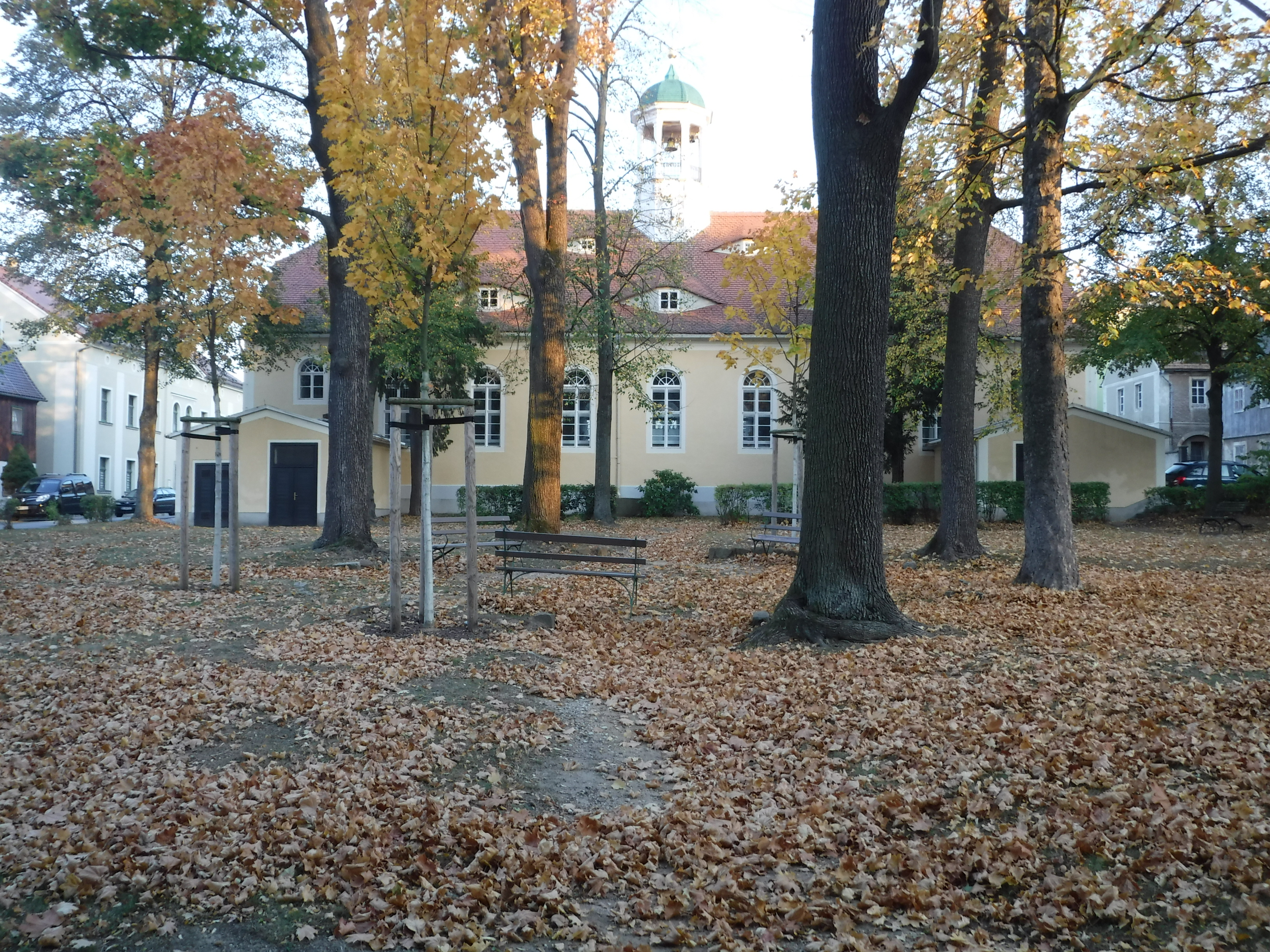 Zinzendorfplatz 8: Gemeingarten (Bildhintergrund: Betsaal) Der 1758 errichtete Betsaal bildete mit dem angrenzenden Gemeingarten das Zentrum der Kolonie. Ursprünglich wurde der Garten vom Gemeindiener (Pfarrer) und dem Vorsteher (Bürgermeister) als Nutzgarten bewirtschaftet. Ende des 19. Jahrhunderts gab man diesen zugunsten einer öffentlichen Anlage auf. Das regelmäßige Wegesystem mit den dieses begleitenden Baumreihen bezieht sich auf die Ost-West-Achse des Betsaals. In der Mitte befindet sich eine platzartige Erweiterung mit einem Baumrondell. Am westlichen Ende des Mittelweges markiert ein Säulen-Eichen-Paar den Zugang. In den Kolonien der Herrnhuter Brüdergemeine bildete immer der Betsaal mit einem angrenzenden Platz das Zentrum der Kolonie. Besonderheit hier ist die Lage des Betsaals, der sich nicht am Rande des Platzes, sondern auf dem Platz befindet. Erschließung: kreuzförmiges Wegesystem, Hauptwege Nord-Süd-Weg und Ost-West-Weg kreuzen sich und bilden platzartige Erweiterung im Zentrum des Platzes, jeweils ein weiterer Weg parallel zu den Platzkanten und ein Nord-Süd-Weg entlang des Betsaals, alle Wege mit wassergebundener Decke Vegetation Alleen und Baumreihen: lückenhafte Reihen aus Winter-Linden (Tilia cordata) entlang der äußeren Wege, Rondell aus ehemals acht (jetzt sechs) Spitz-Ahornen (Acer platanoides) um runden Platz im Zentrum der Anlage Einzelbäume: Baumpaar aus zwei Säulen-Eichen (Quercus robur ‚Fastigiata’) am westlichen Endes des Ost-West-Weges Hecken und Sträucher: Reste einer ehemaligen Liguster-Hecke (Ligustrum vulgare) an der Südseite des Platzes